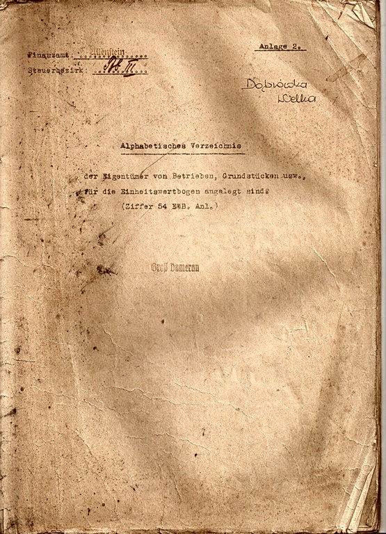 Strona tytułowa spisu właścicieli i użytkowników działek we wsi Gross Damerau (Dąbrówka Wielka), 1937 rok.